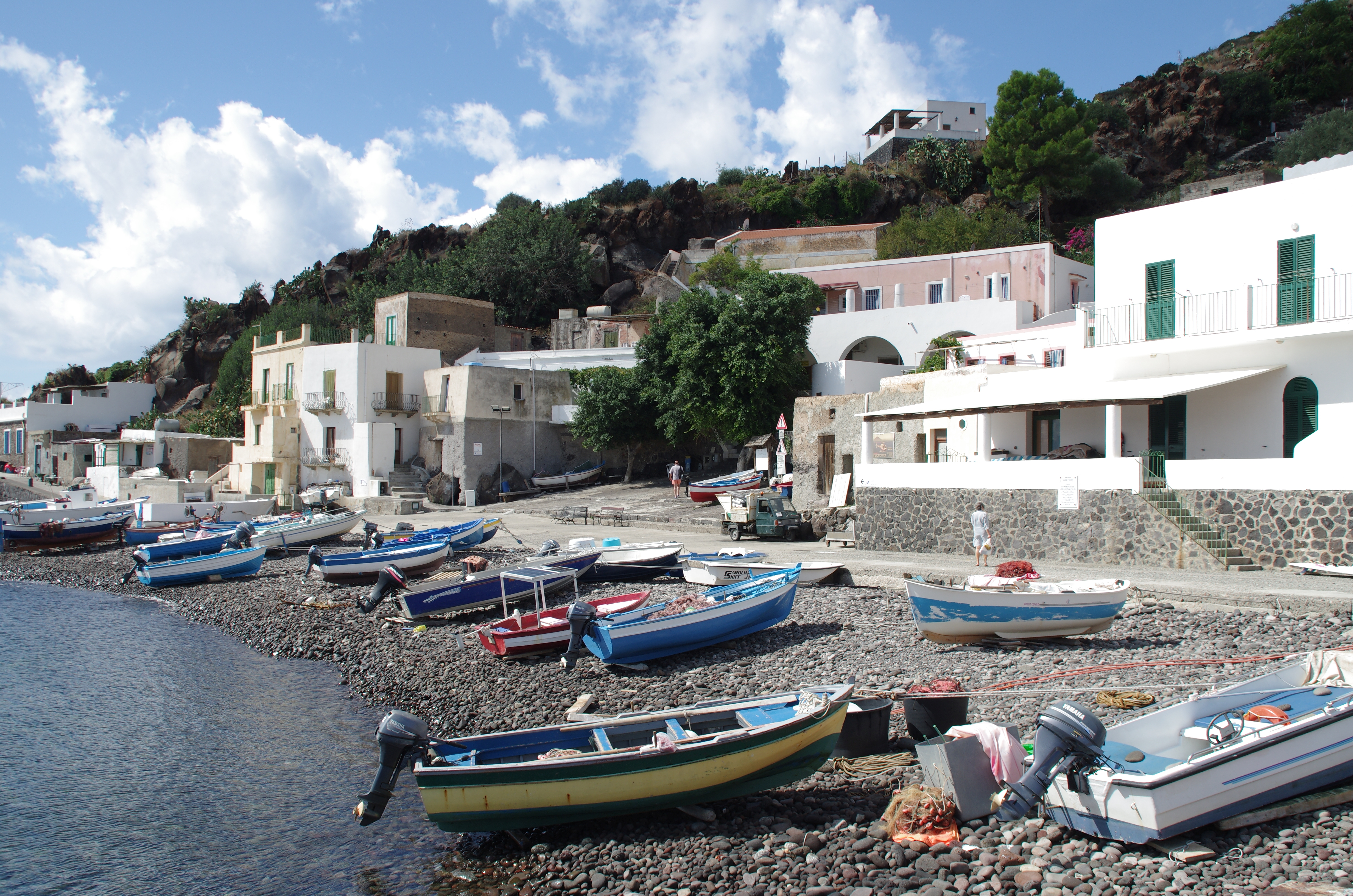 Alicudi, ein Ortsteil von Lipari in der Region Sizilien. Das Bild zeigt den Hafen von Alicudi.